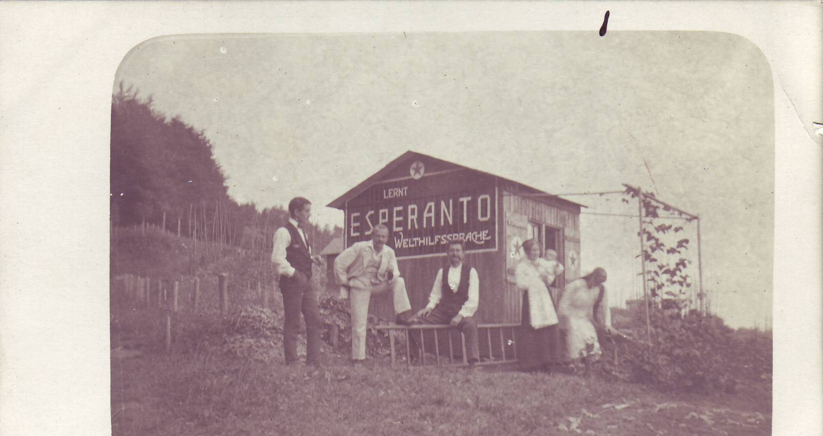 Esperanto-kabano de Karl Jost Kategorio:Bildoj de Kantono Zuriko Kategorio:Bildoj alŝutitaj de DidiWeidmann